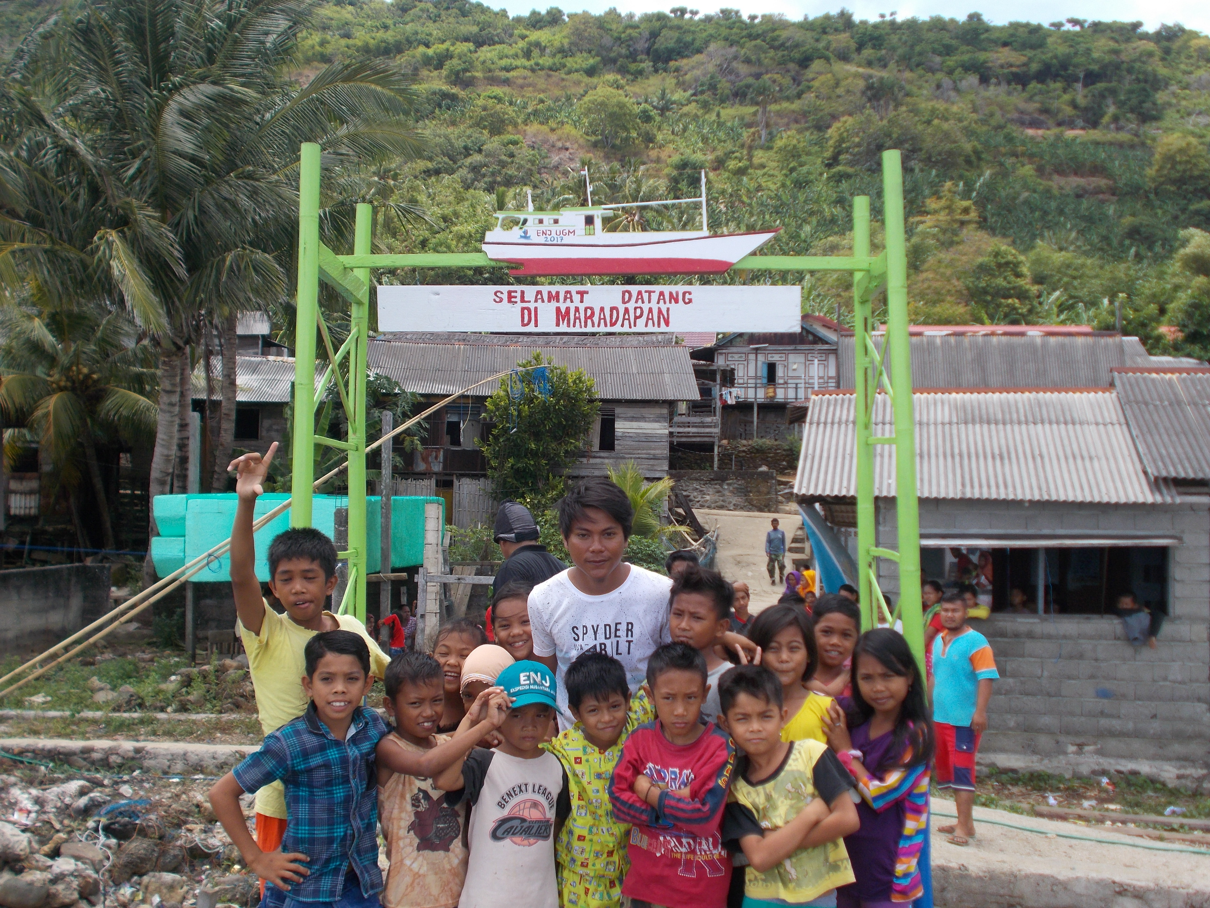 Gapura Selamat Datanag Desa